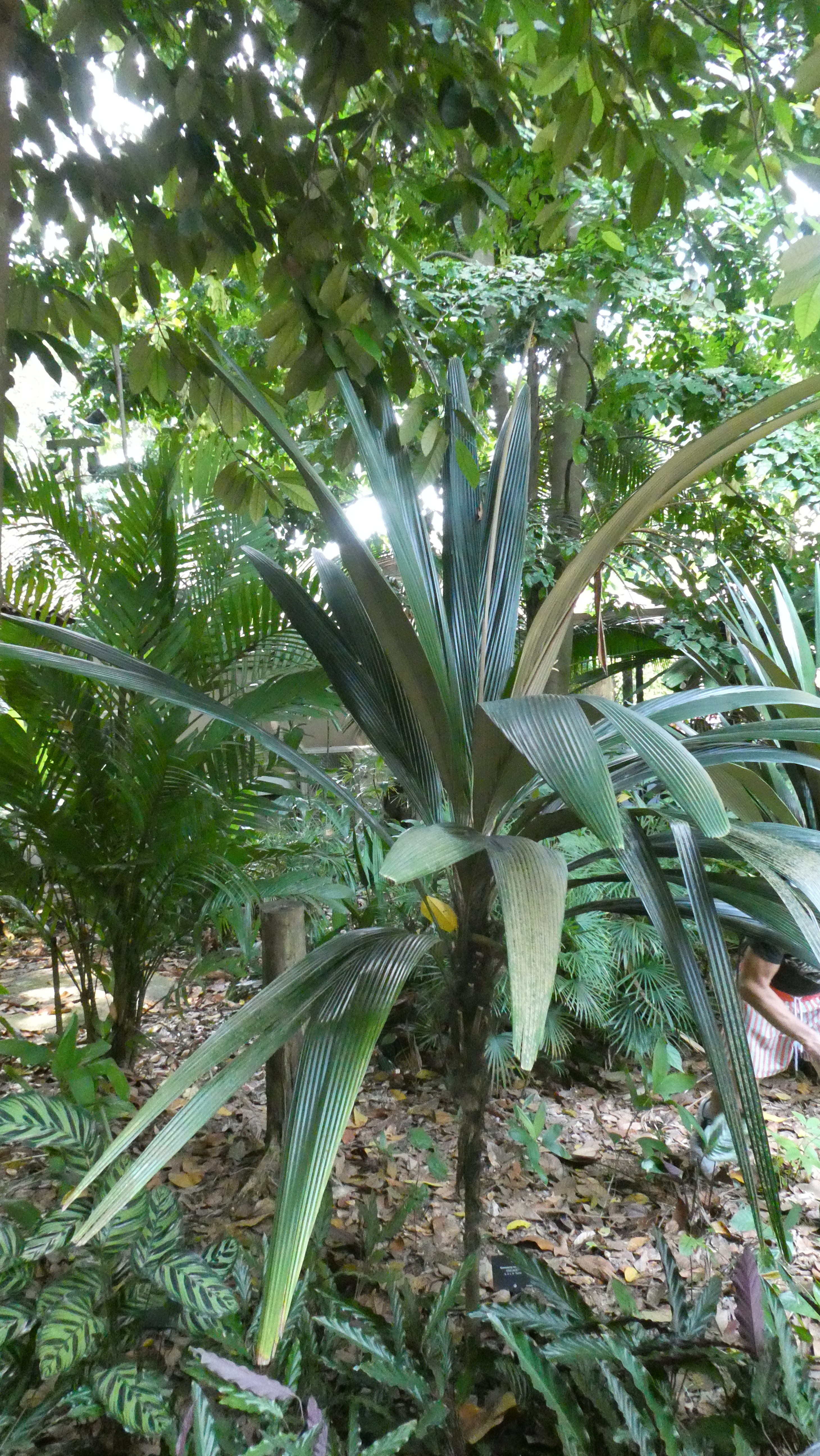 Jardin Botanique de Singapour , palmier Sommieria leucophylla